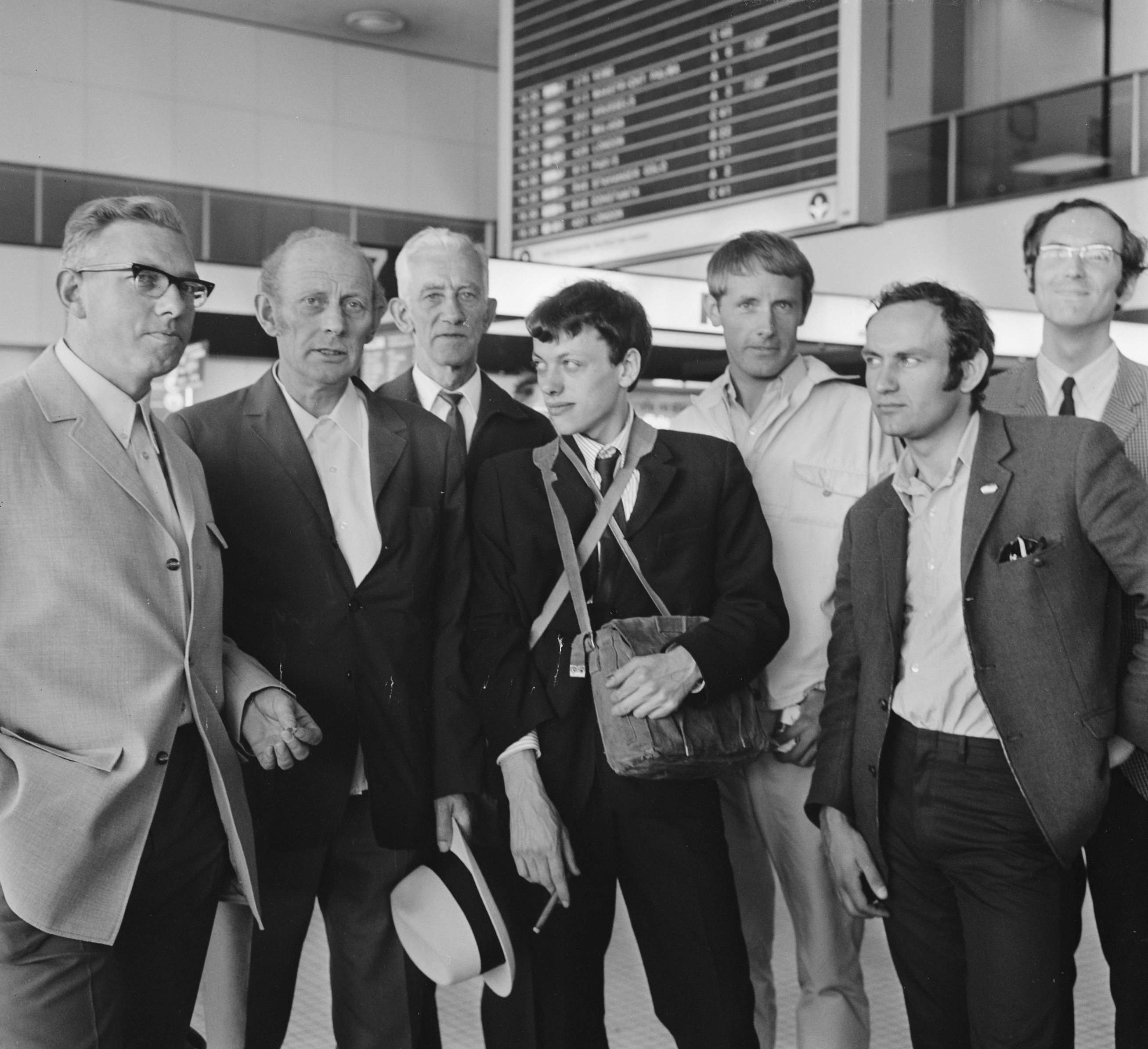 Vertegenwoordigers van het Nederlands Palestina Komitee vertrekken van Schiphol naar Egypte en andere landen in het Nabije Oosten. V.l.n.r.: pater J. van Eupen, J. H. Davio, Piet Nak, B. de Wolf, XXX, Bertus Hendriks en drs. Wim Bartels Datum 28 juni 1969